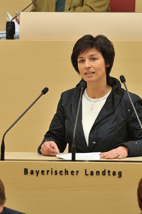 Ulrike Müller, MdL im Plenarsaal des Bayerischen Landtages